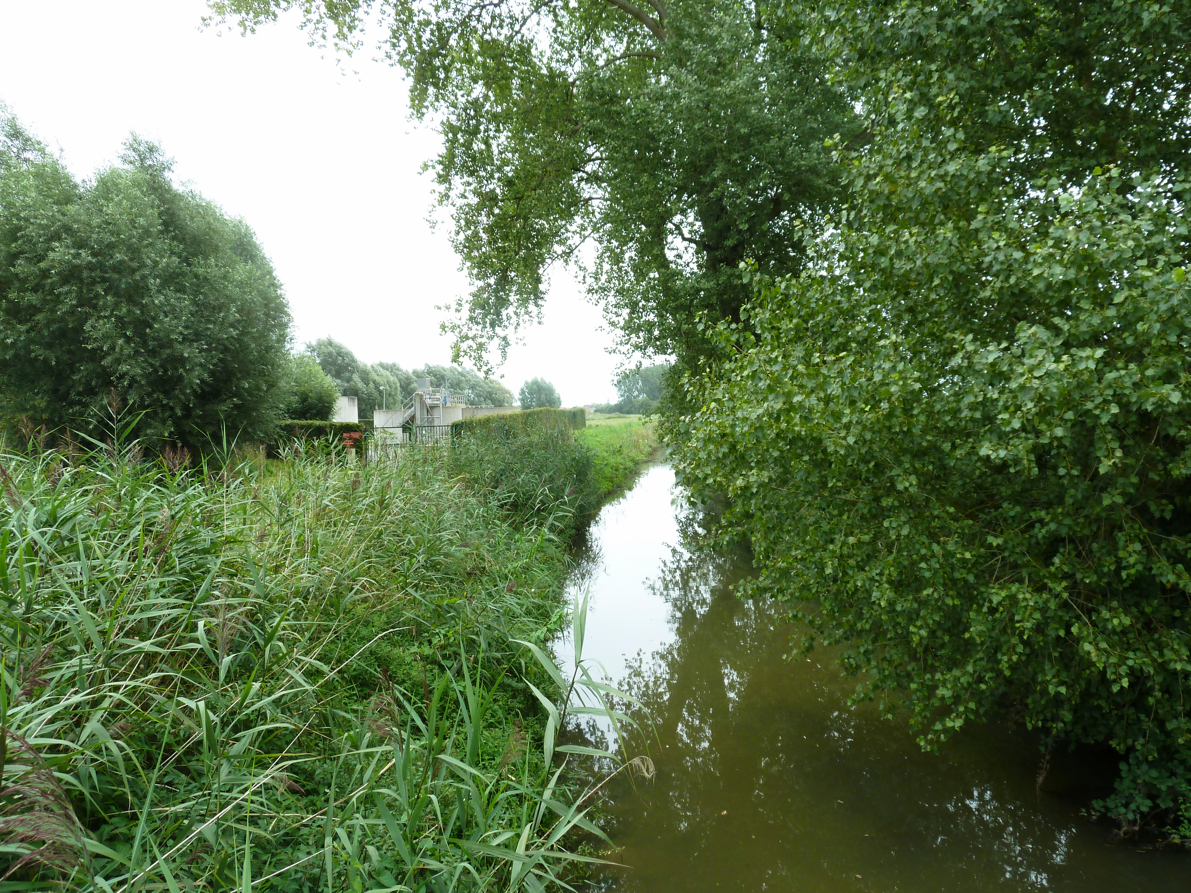 La Nouvelle Melde à Boëseghem dans le Nord Nord-Pas-de-Calais.- France.